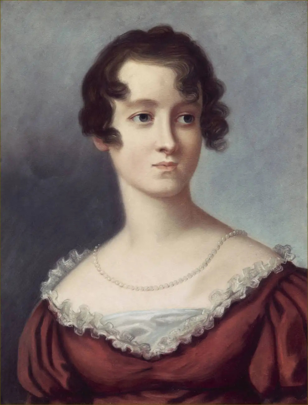 Каролина Луиза Саксен-Веймар-Эйзенахская (1786—1816)? наследная великая герцогиня Мекленбург-Шверинская.